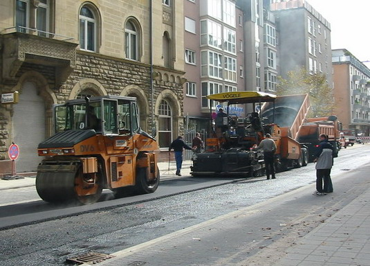 Straßenbaustelle. Vögele Asphaltfertiger und HAMM Kombiwalze DV6